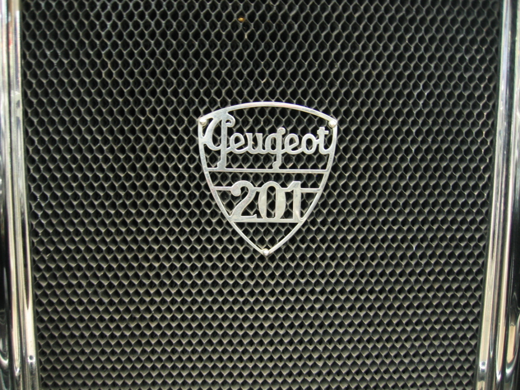 Peugeot 201 - Musée Peugeot Sochaux